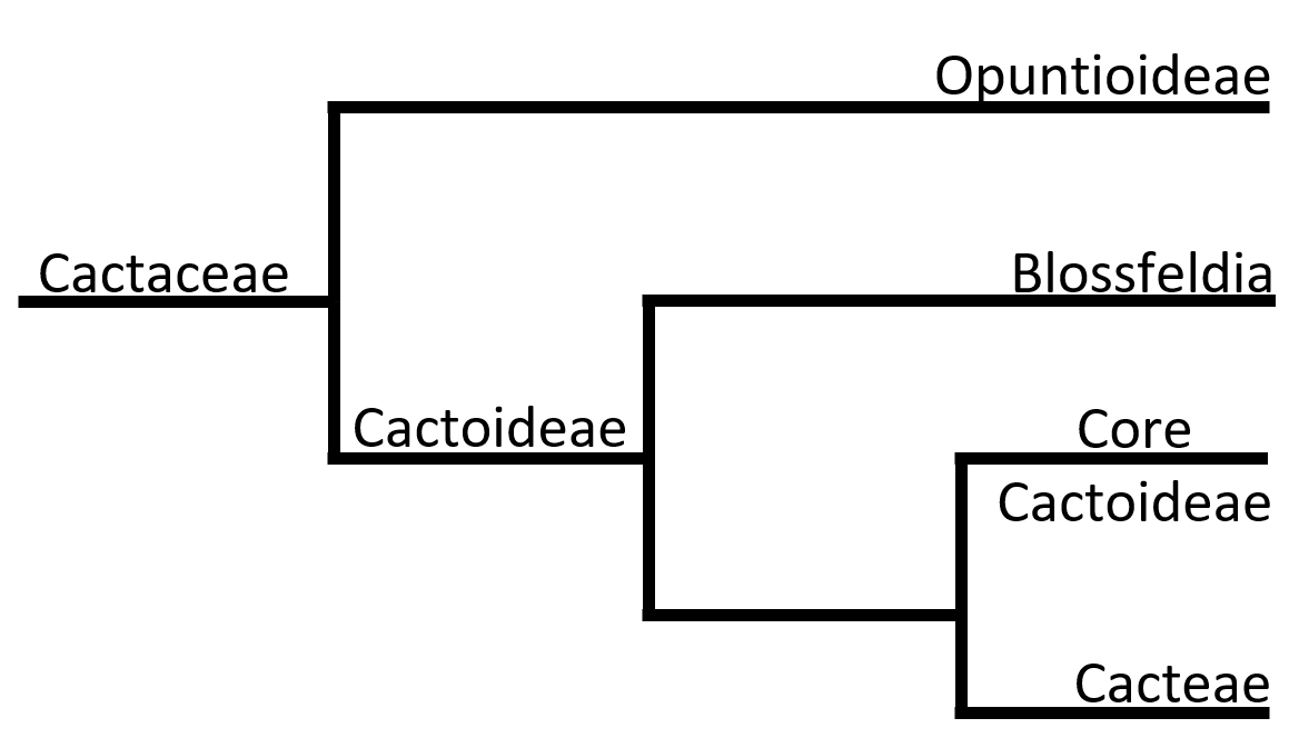 C'est un arbre phylogénétique simplifié de la famille des Cactaceae afin de mettre en évidence la place du genre Blossfeldia